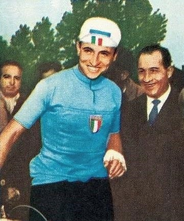 Ercole Baldini aux JO de Melbourne en 1956 (champion olympique sur route), 'Olympia 1972' Panini figurina n°190.